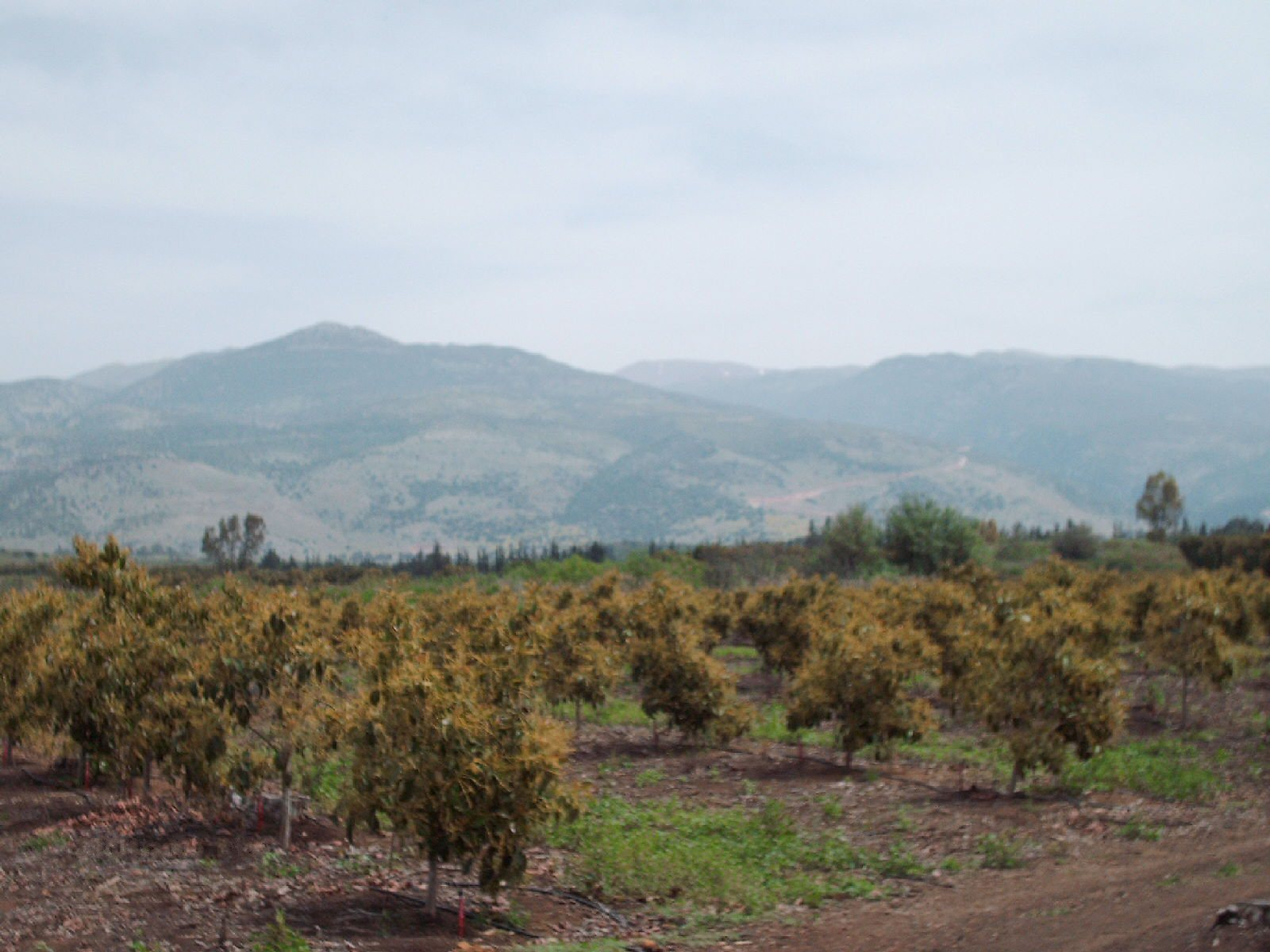 מטעי האבוקדו בקיבוץ דפנה על רקע הר החרמון